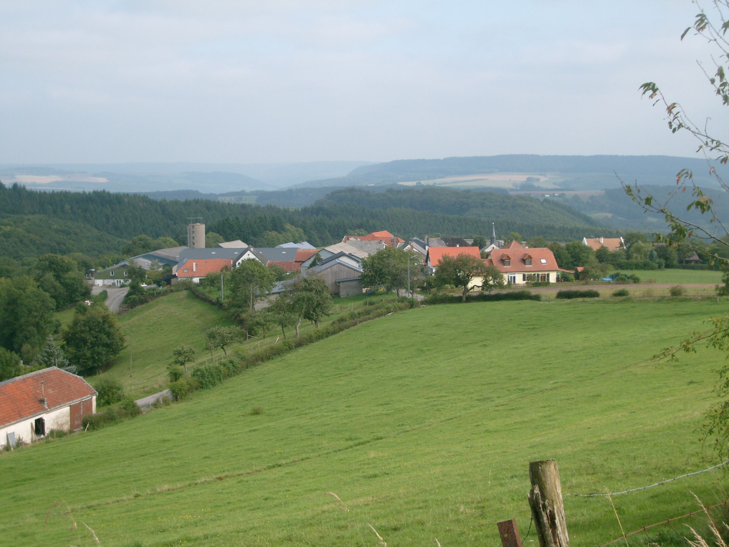 Vue vu Norden op Waalsdref